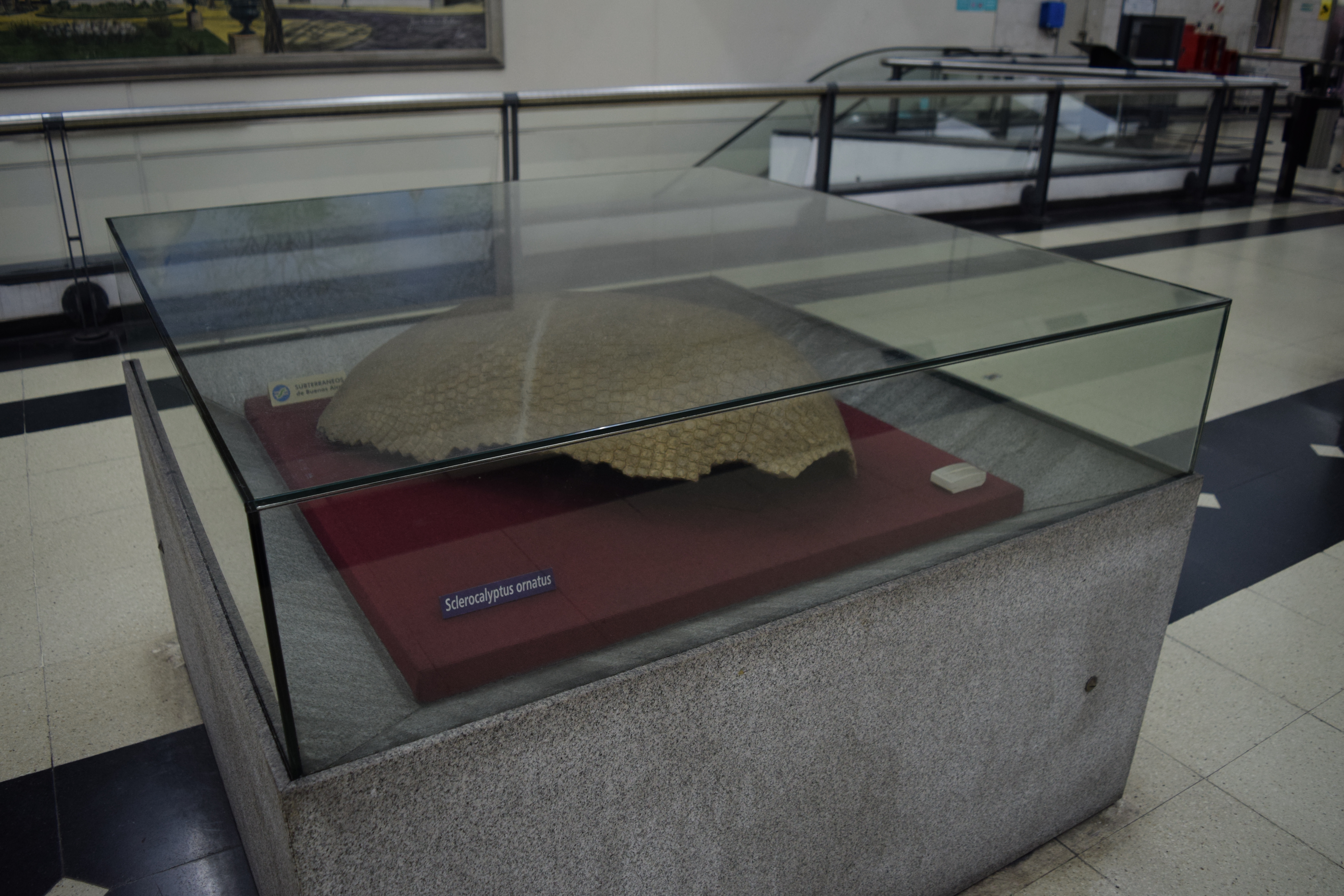 Parte de la exposición permanente de la estación.